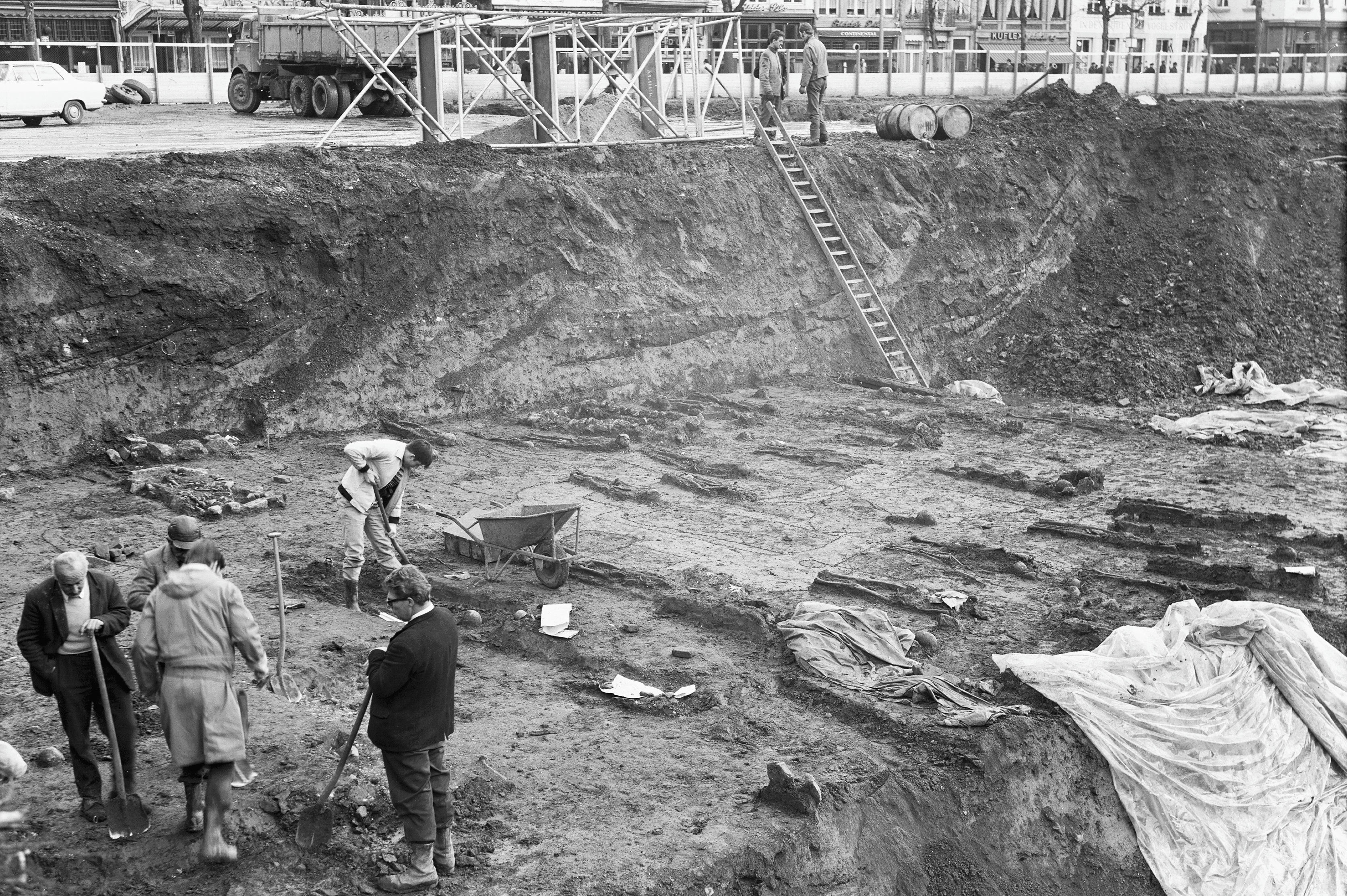 noord-zijde, opgraving Merovingisch grafveld